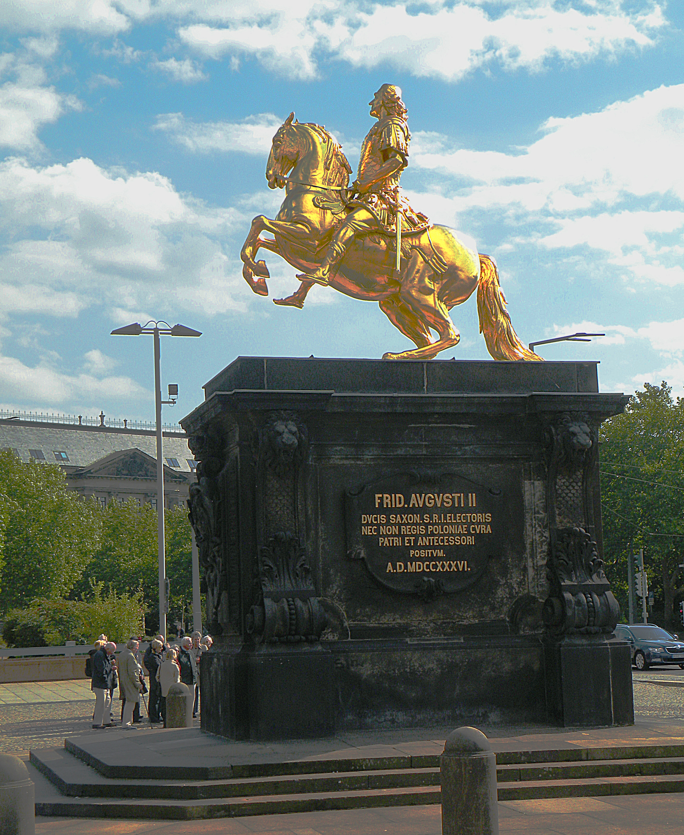 Der Goldene Reiter, Denkmal Augusts des Starken